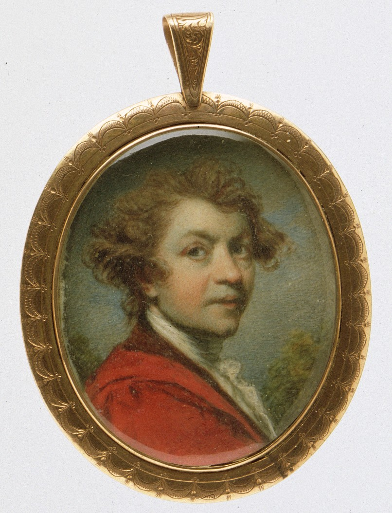 Painting, miniature; Miniatures